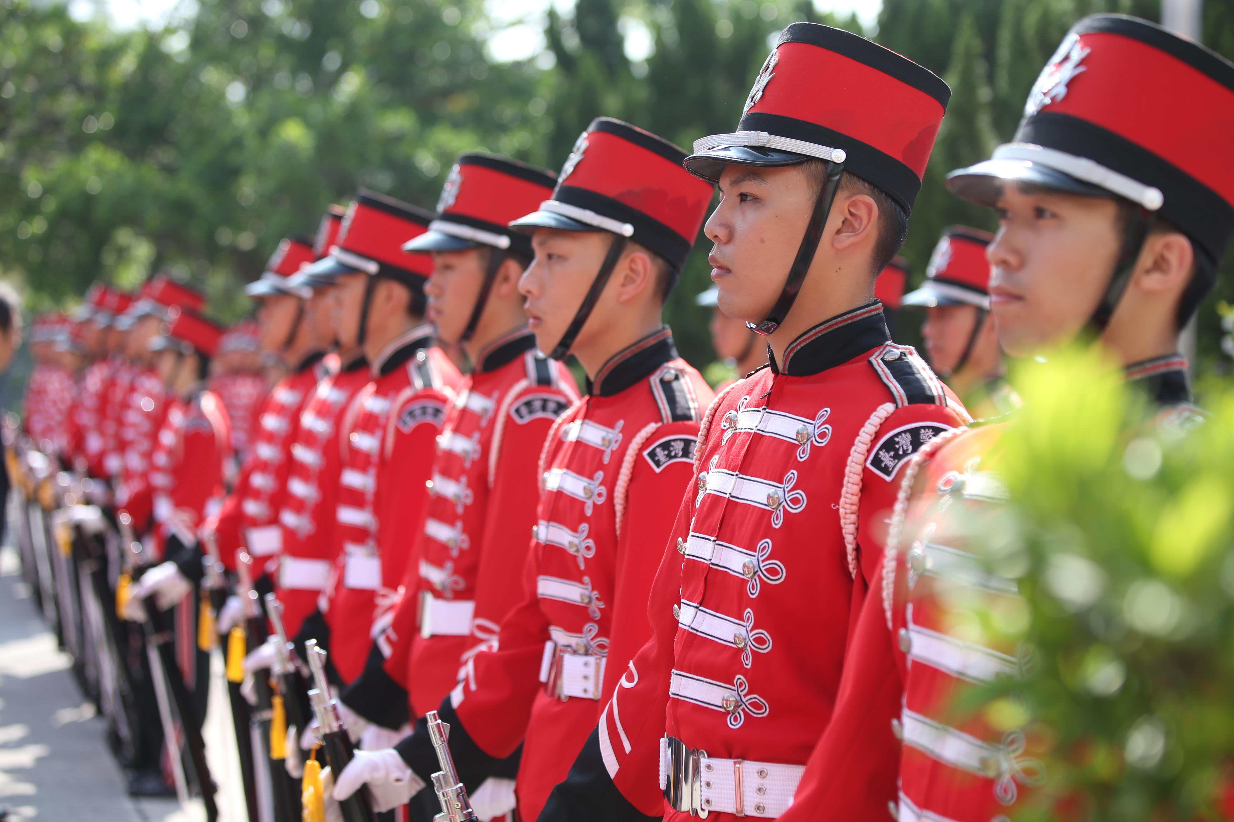 臺灣警察專科學校慶祝71週年校慶大會，臺灣警察專科學校儀隊。